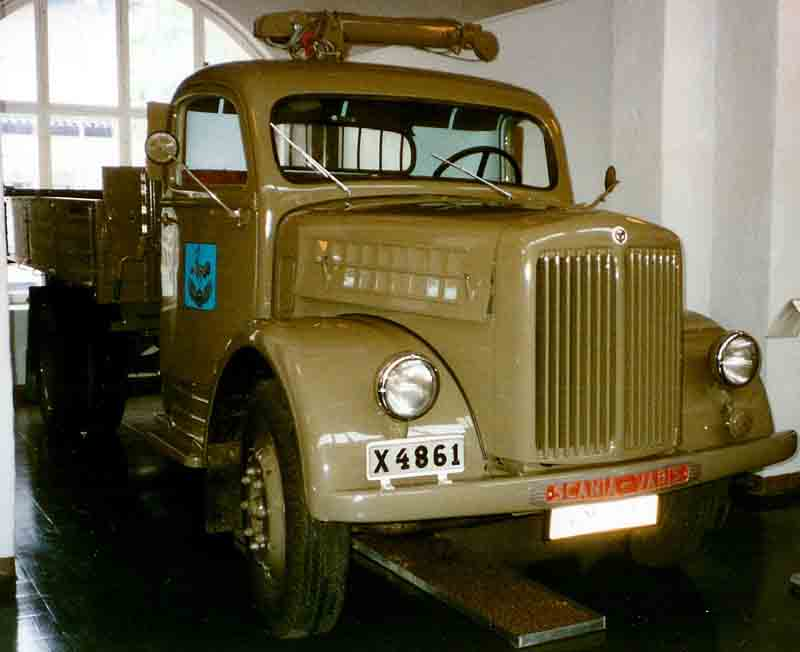 Scania-Vabis 2L12 Truck 1947